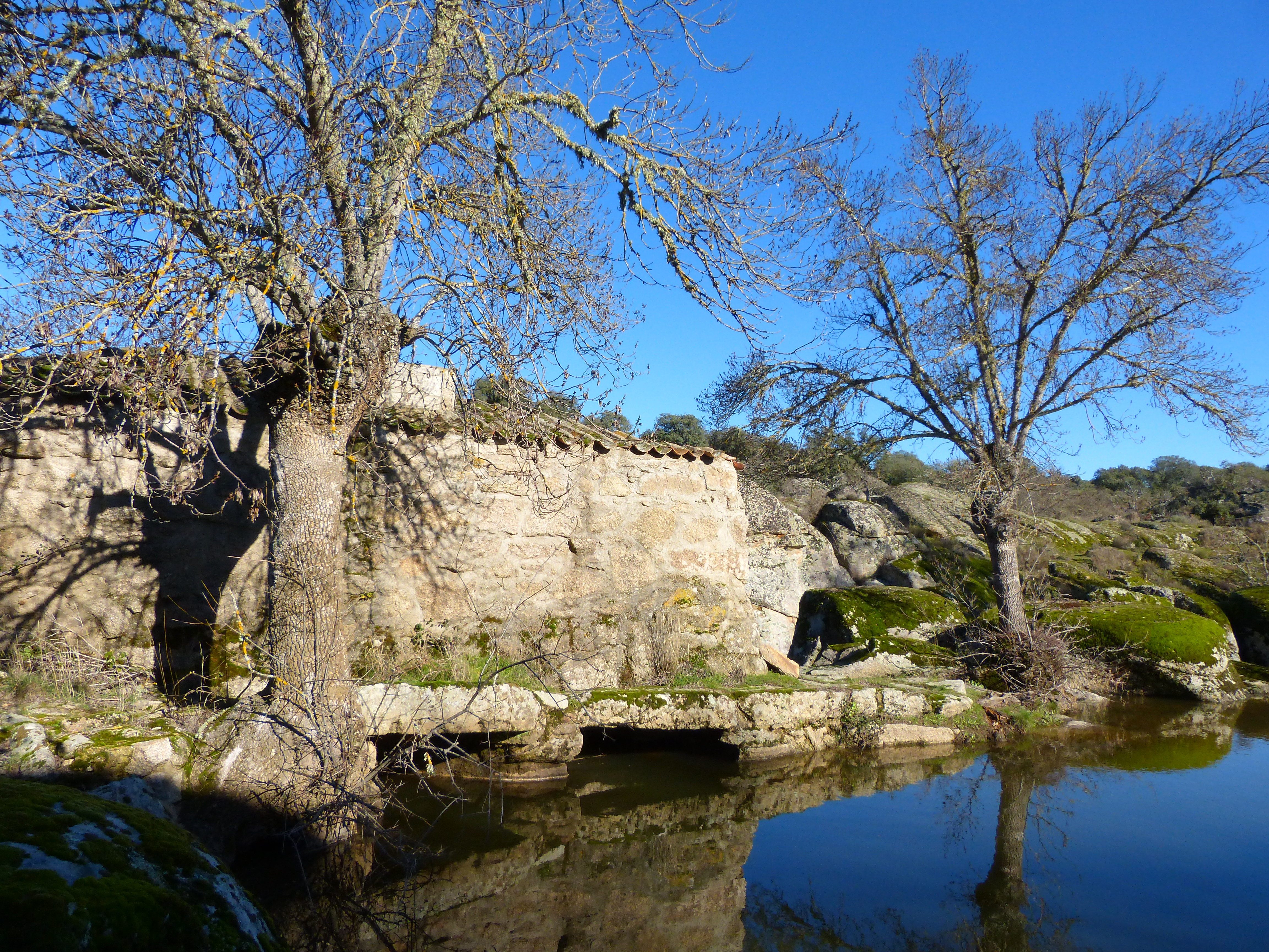 Riberas de los ríos Huebra, Yeltes, Uces y afluentes This is a photography of a Special Area of Conservation in Spain with the ID: ES4150064. Natura2000 entry, EEA entry